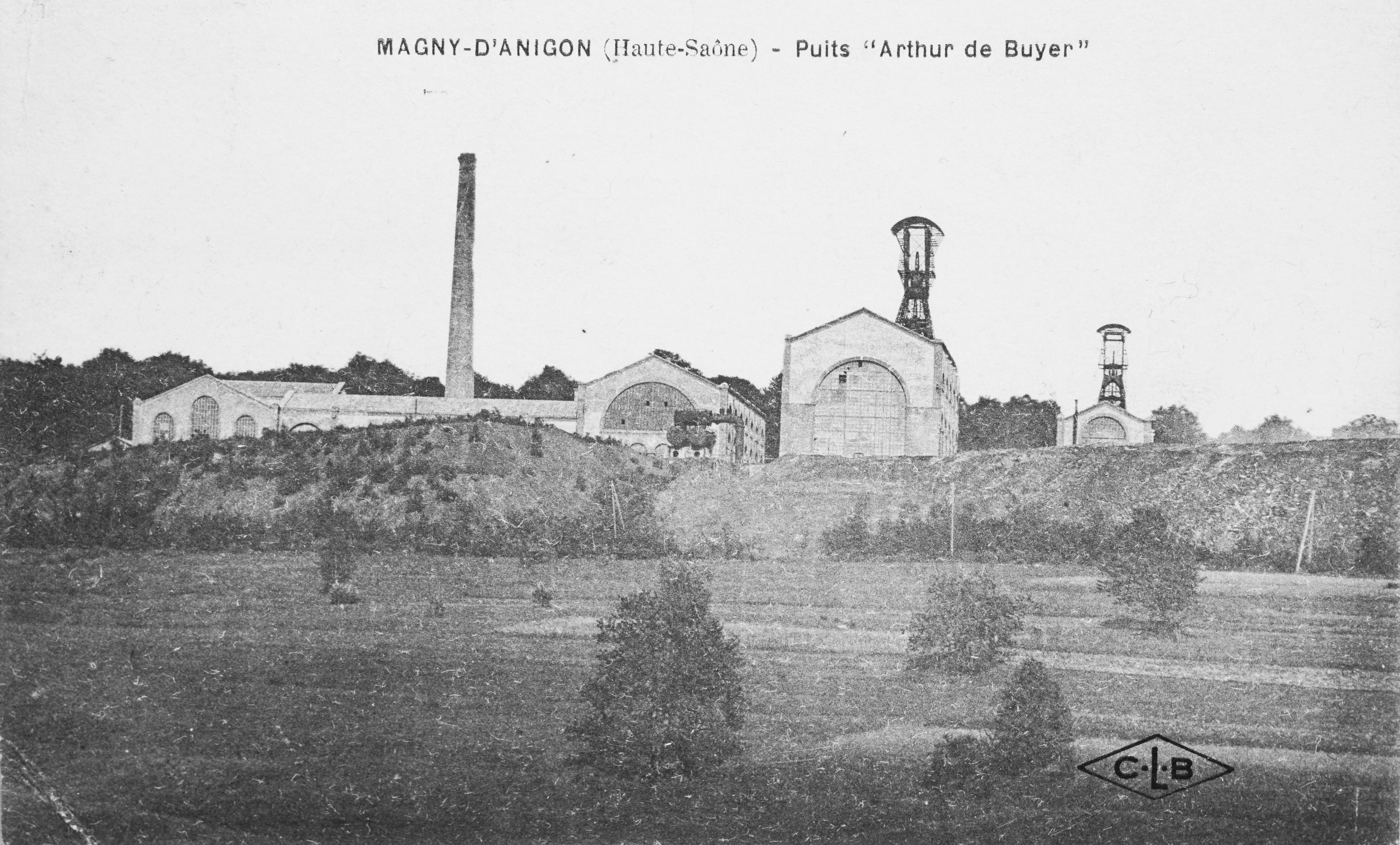 Le puits Arthur de Buyer, vue d'ensemble.